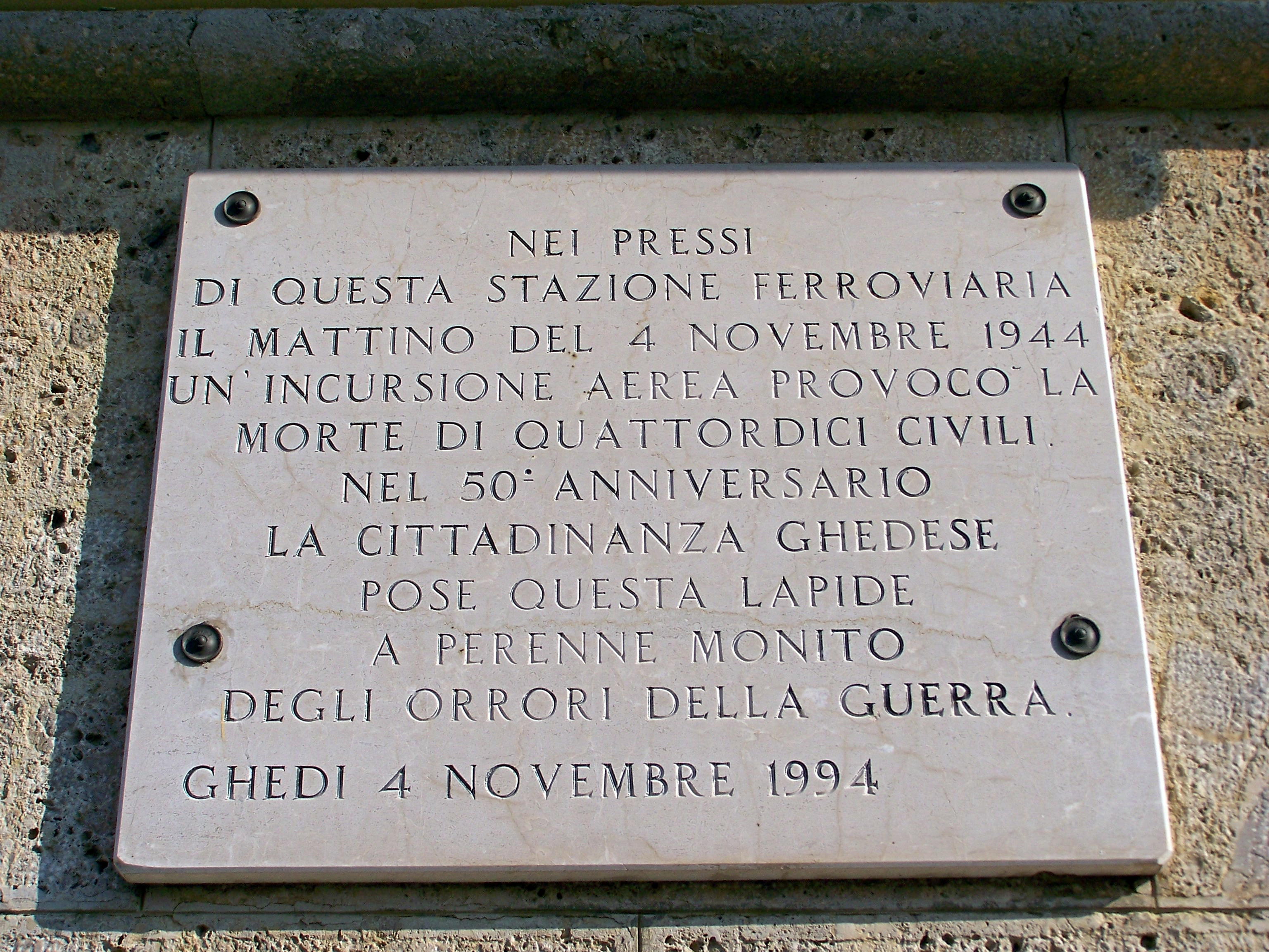 La lapide commemorativa del bombardamento della stazione ferroviaria avvenuto il 4 novembre 1944